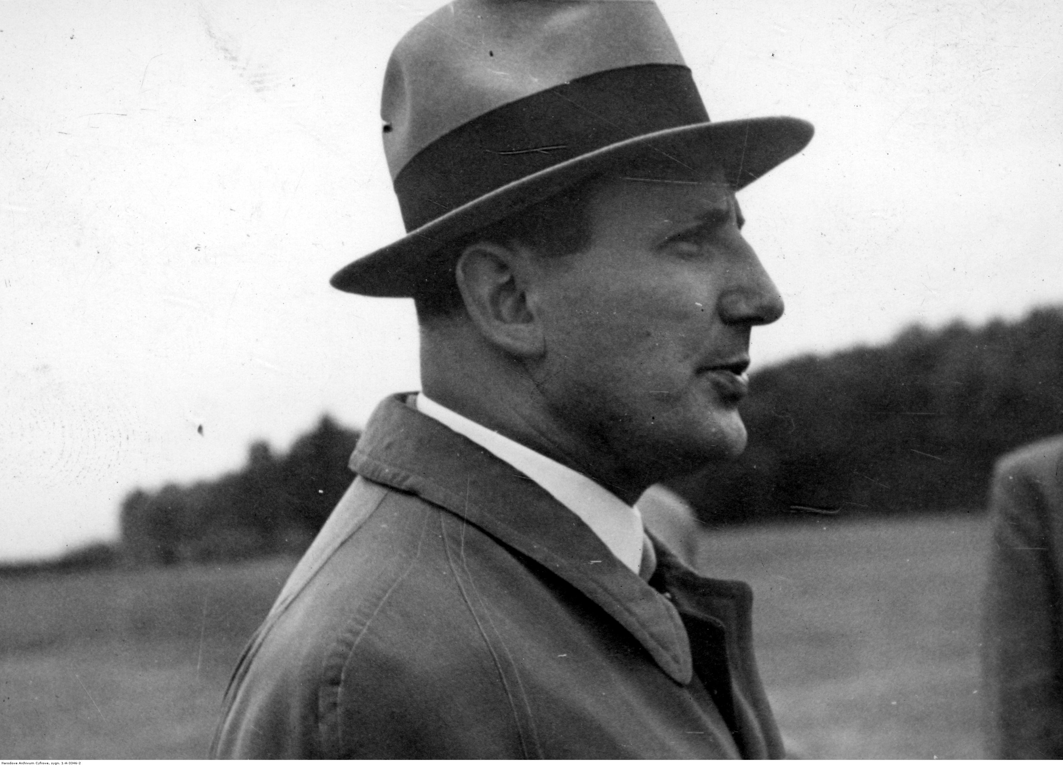 Leon Raszeja prezydent miasta Torunia w latach 1936-39